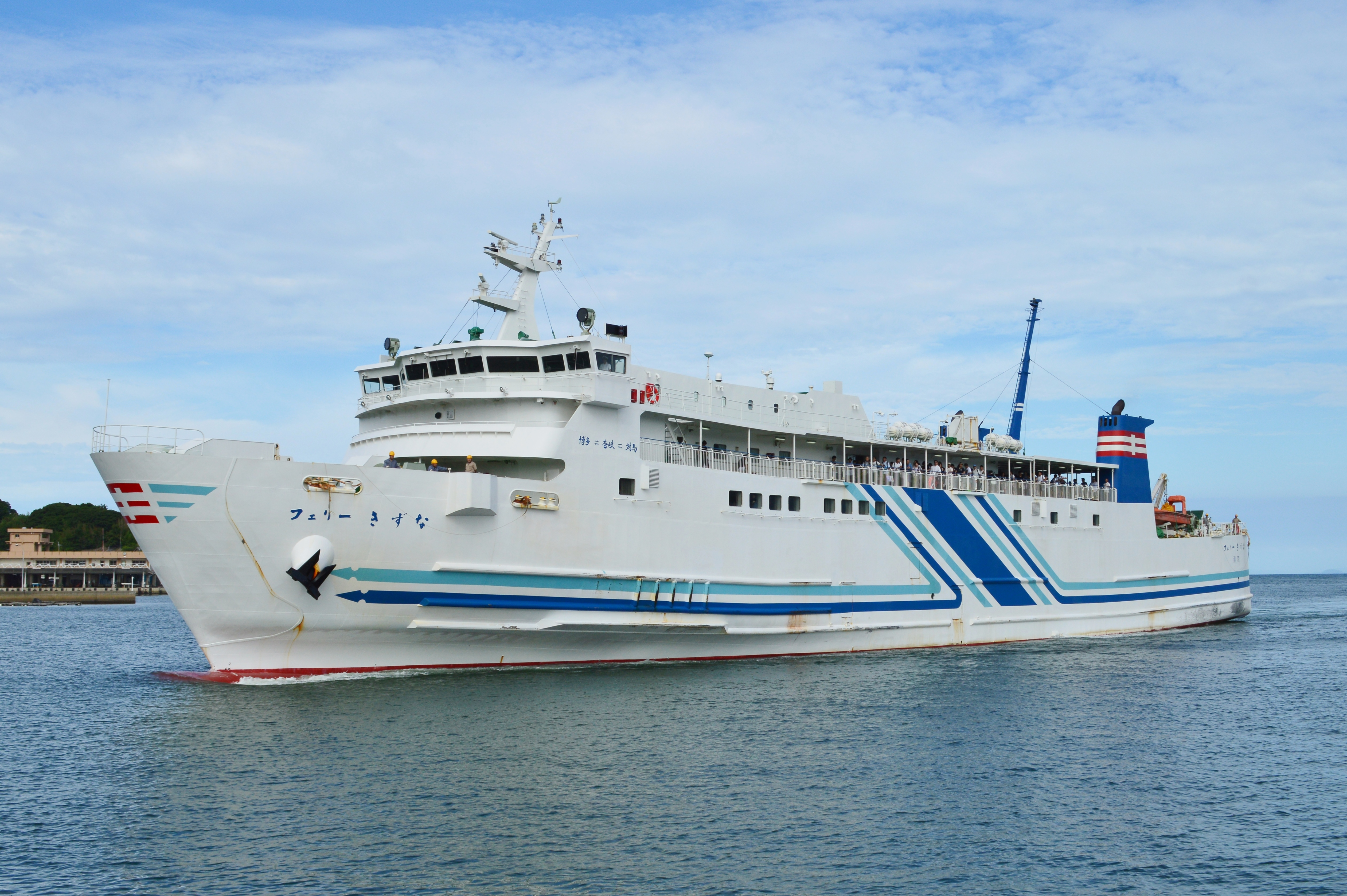 フェリーきずな (芦辺港にて)